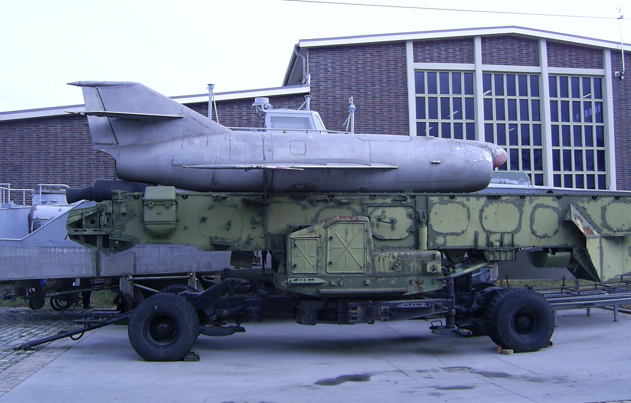 Der erste sowjetische (wörtlich übersetzt) Antischiffs Raketen Komplex (4K87) S-2 Sopka (SSC-2B SAMLET) auf einer fahrbaren Startrampe. Im MHM in Dresden.